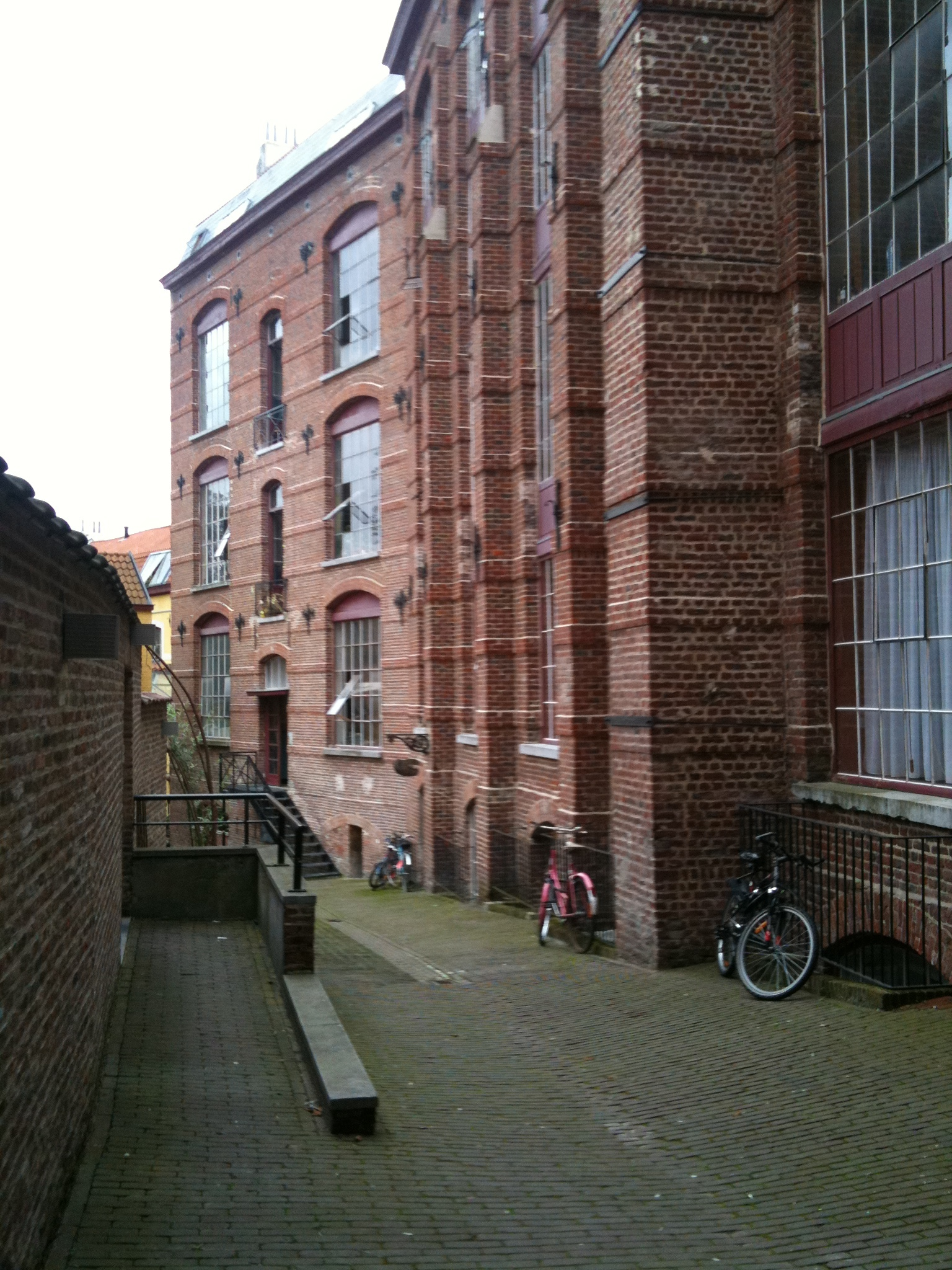 Ateliers Mommens